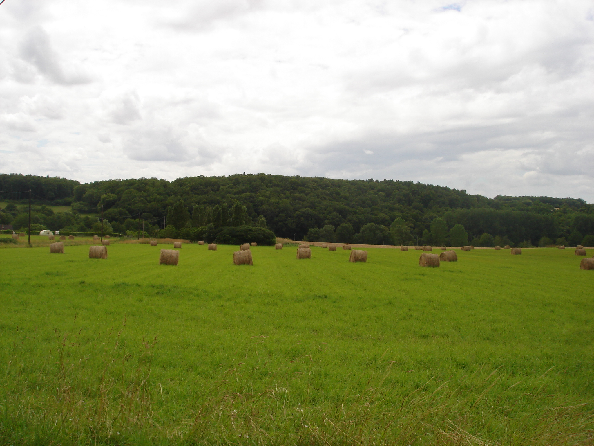 Blancois : Un champ d'herbe, à Mérigny (36).